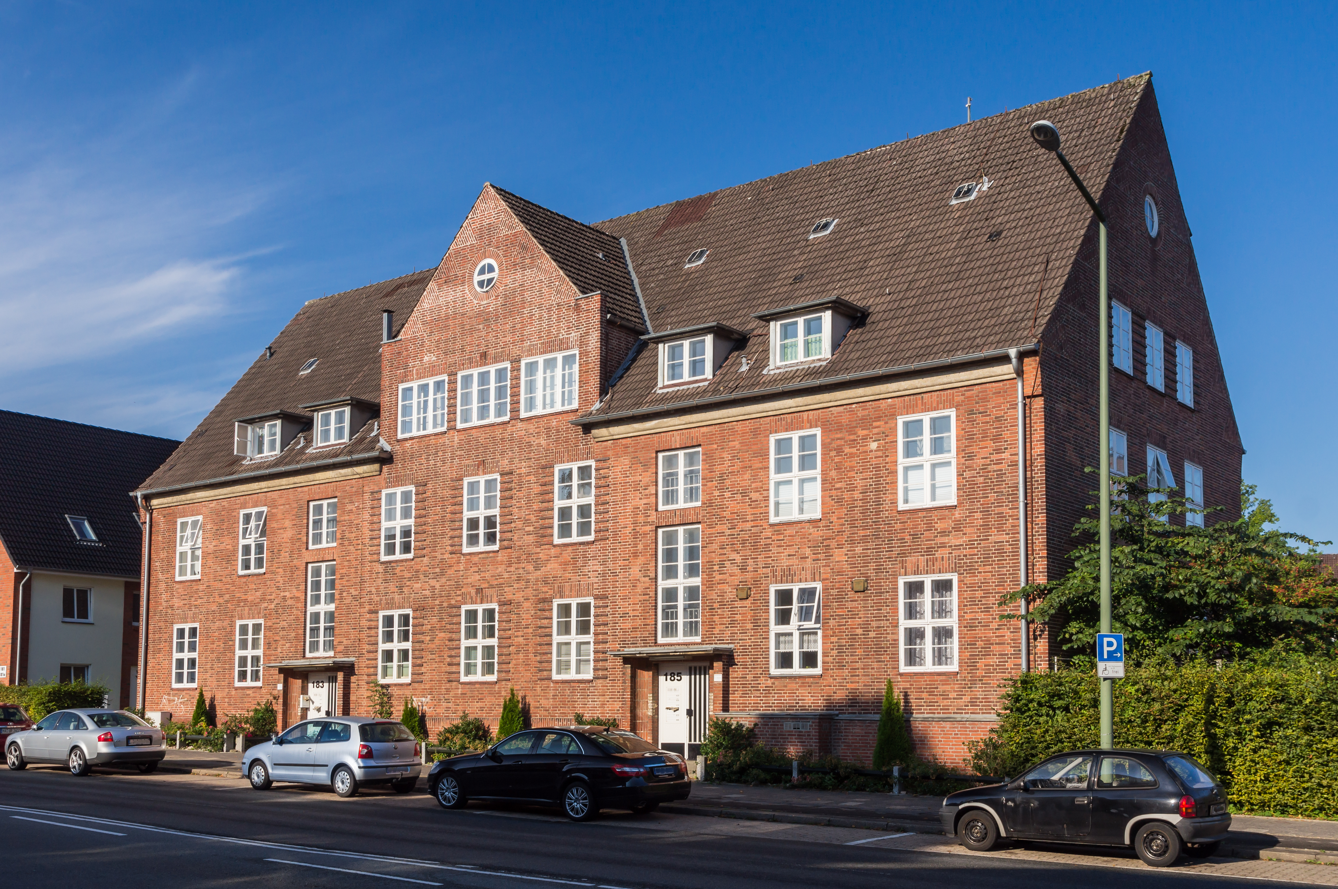 Flensburg-Mürwik, Mürwiker Strasse 183-185, Verwaltungsgebäude, Denkmal-Nr. 14. Errichtet 1960. Seit ca. 2009 Sanierung und Umbau zum Wohnhaus mit 12 Wohnungen.